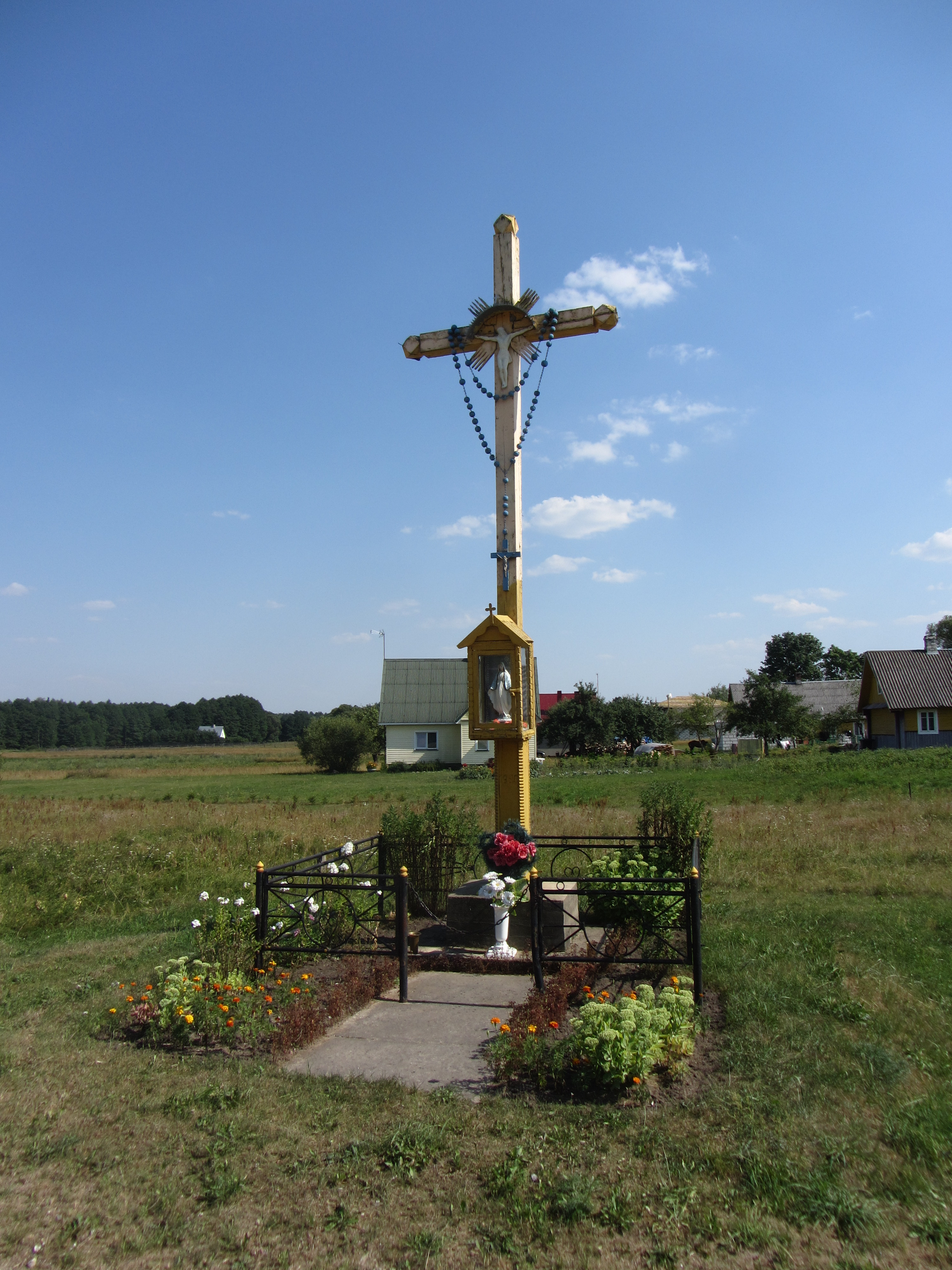 Kaniūkai, Lithuania